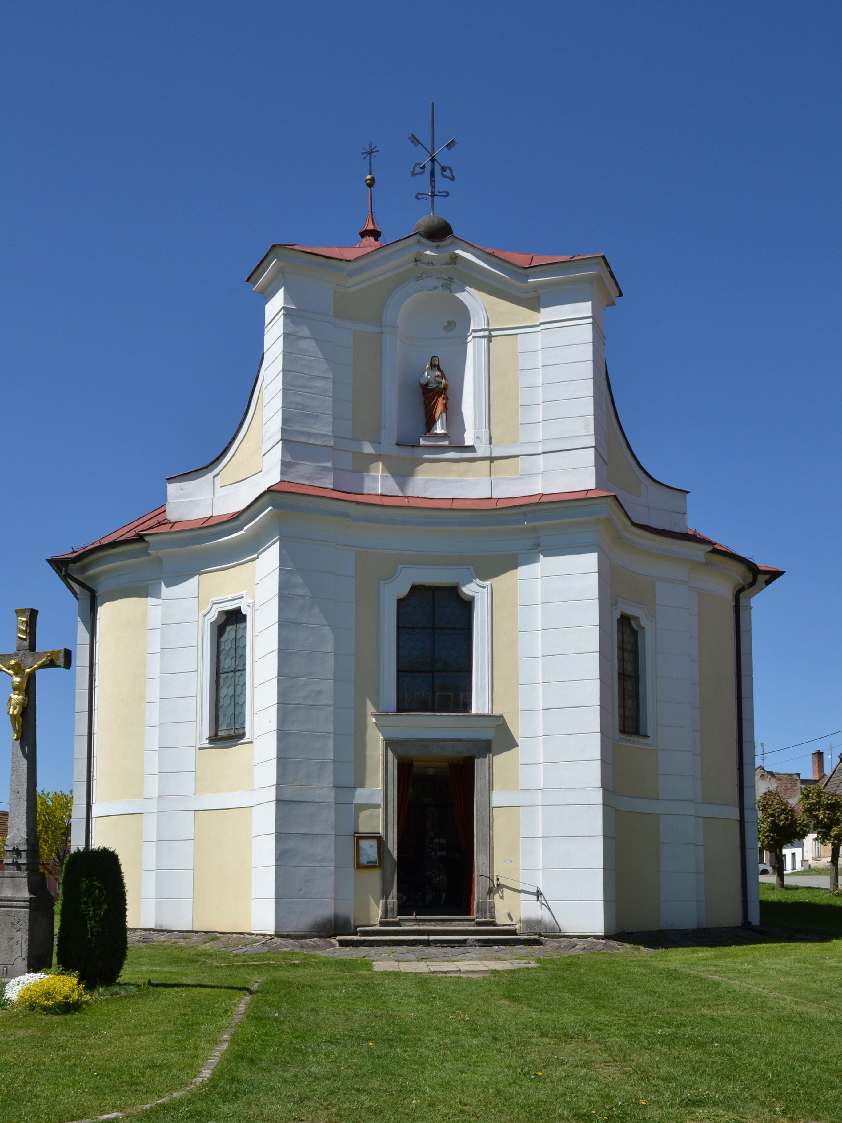 Horní Bobrová - kostel sv. Petra a Pavla, východní průčelí